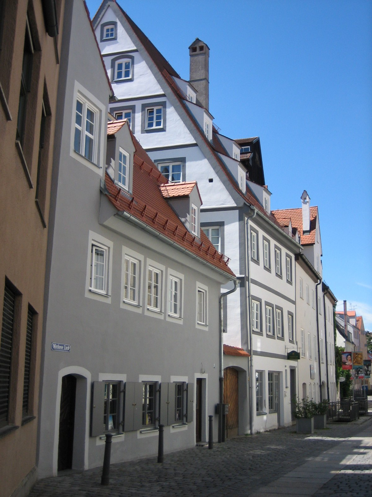 Augsburg, Blick auf Gebäude in der Straße "Mittlerer Lech"